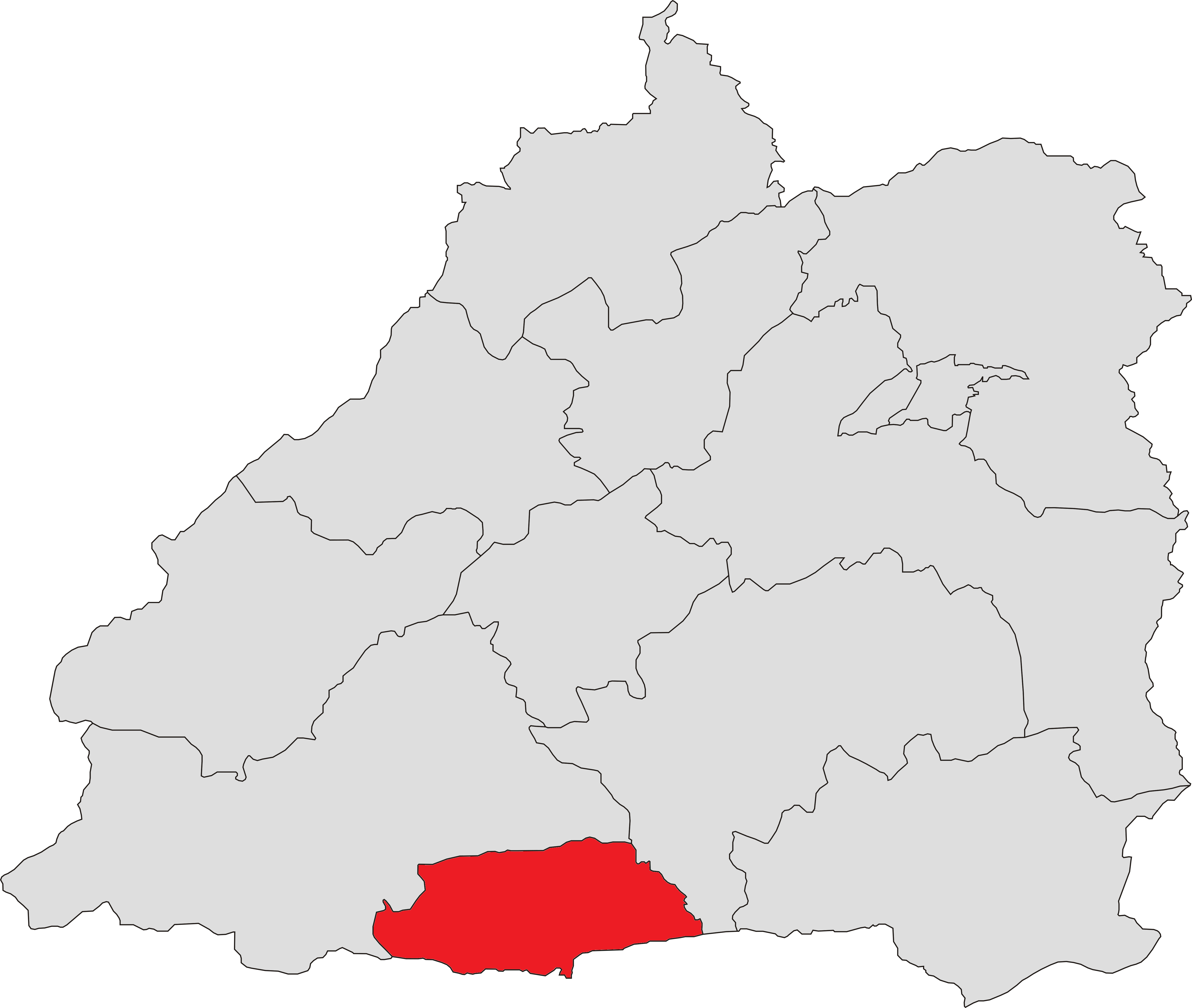 中文（中国大陆）: 芒市芒海镇位置图